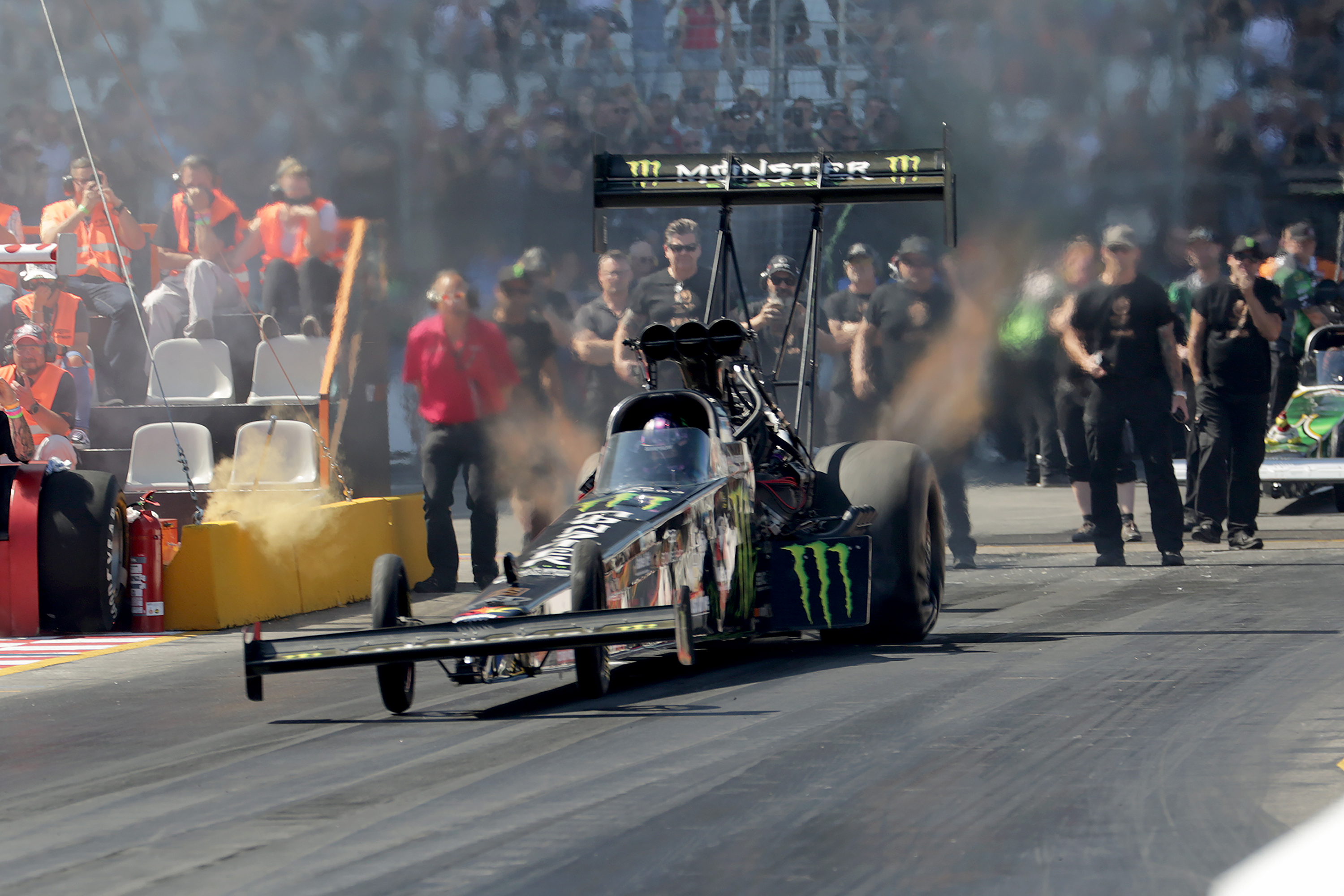 FIA Top Fuel Dragster. Driver: Jndia Erbacher (CH). NitrolympX 2019